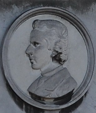 Busto de Agustín Muñoz y de Borbón-Dos Sicilias, I duque de Tarancón, vizconde de Rostrollano y príncipe de Ecuador. En su tumba de Rueil-Malmaison (Francia).